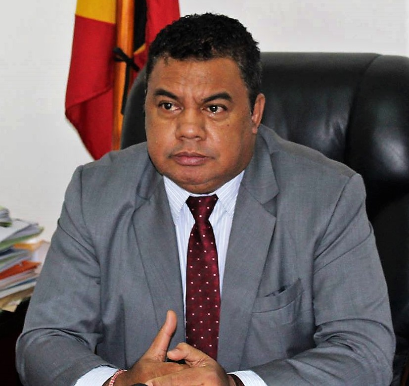 Ministro da Agricultura e Pescas Eng. Joaquim José Gusmão dos Reis Martins.